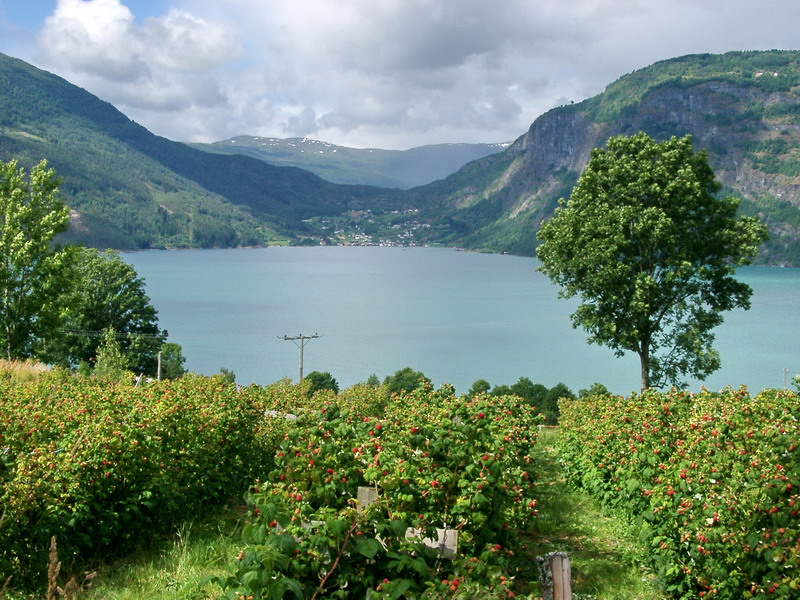 Blick von Urnes nach Solvorn